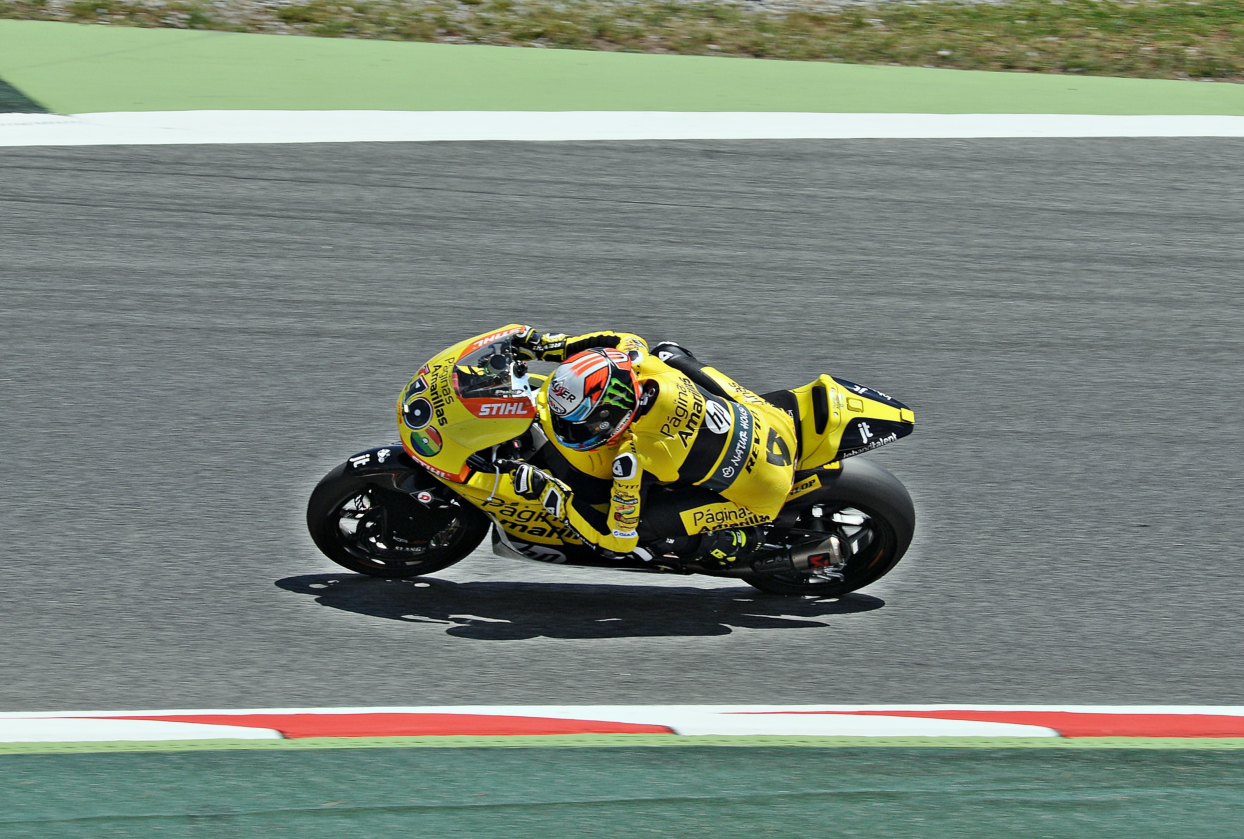 gran premio de cataluña